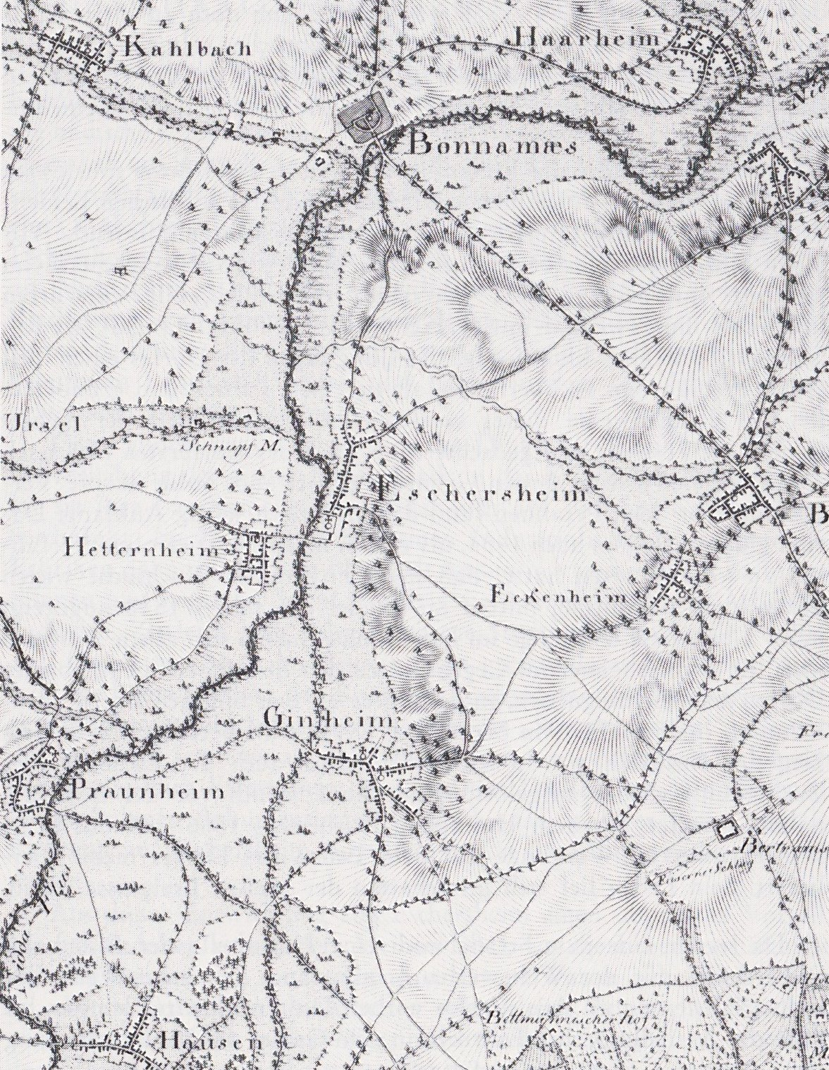 Originalkarte von C. Felsing, Darmstadt